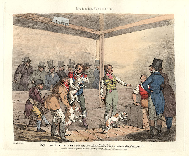 Series: Master George, London